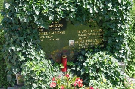 Grab des Mineralogen, Petrographen und Geologen Josef Ladurner (1908-1997) auf dem Ostriedhof Innsbruck-Pradl